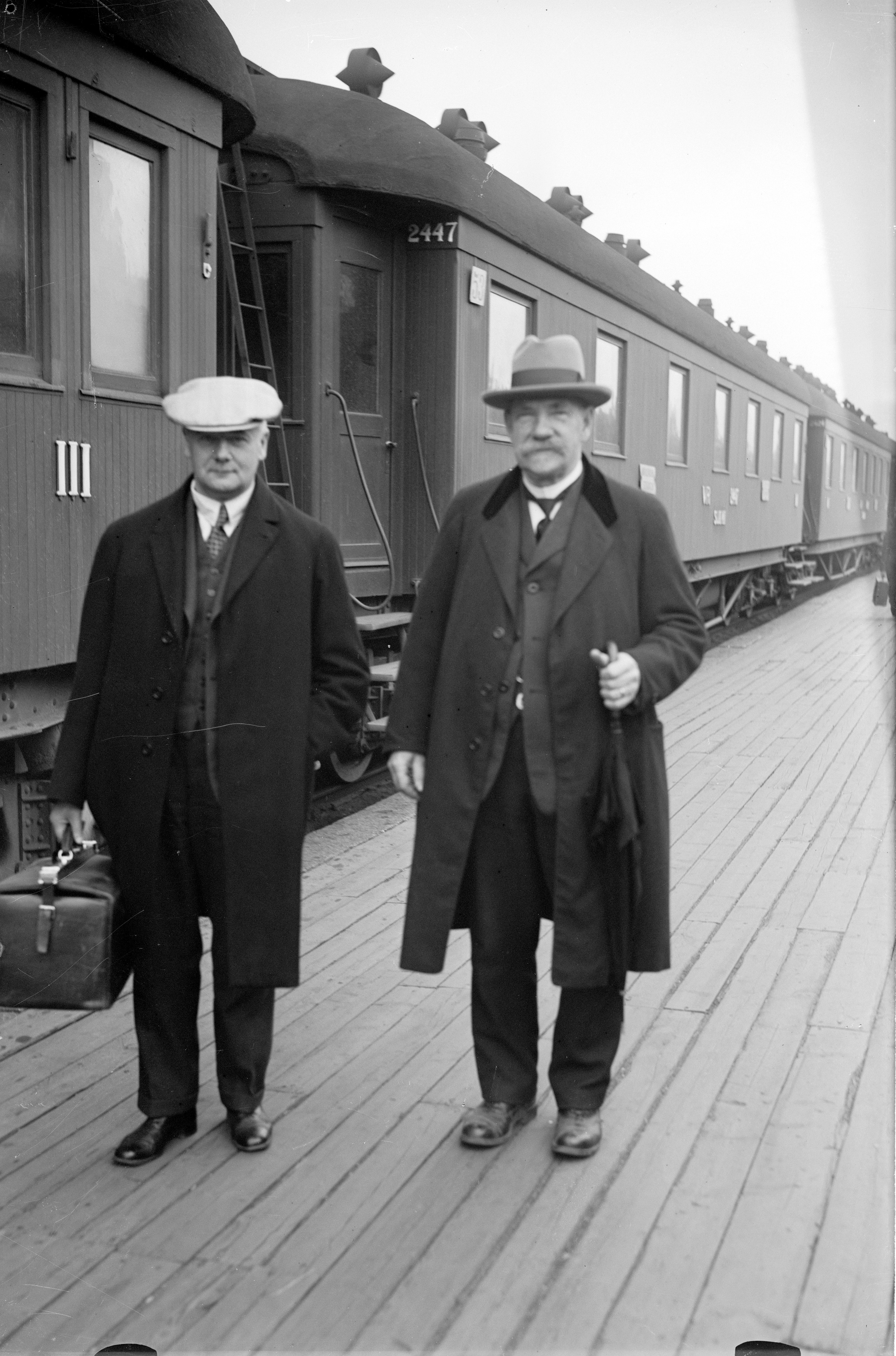 P. E. Svinhufvud rautatieasemalla.